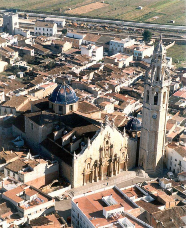 Iglesia parroquial de San Juan Bautista (Alcalá de Xivert)